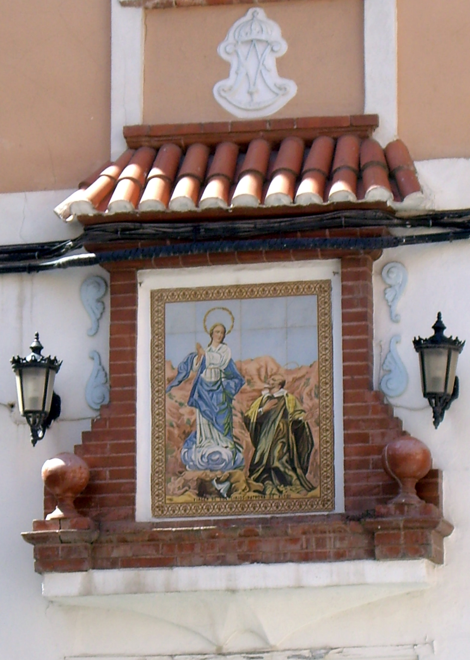 Verge dels Lliris a la façana del antic bar Soler d'Alcoi